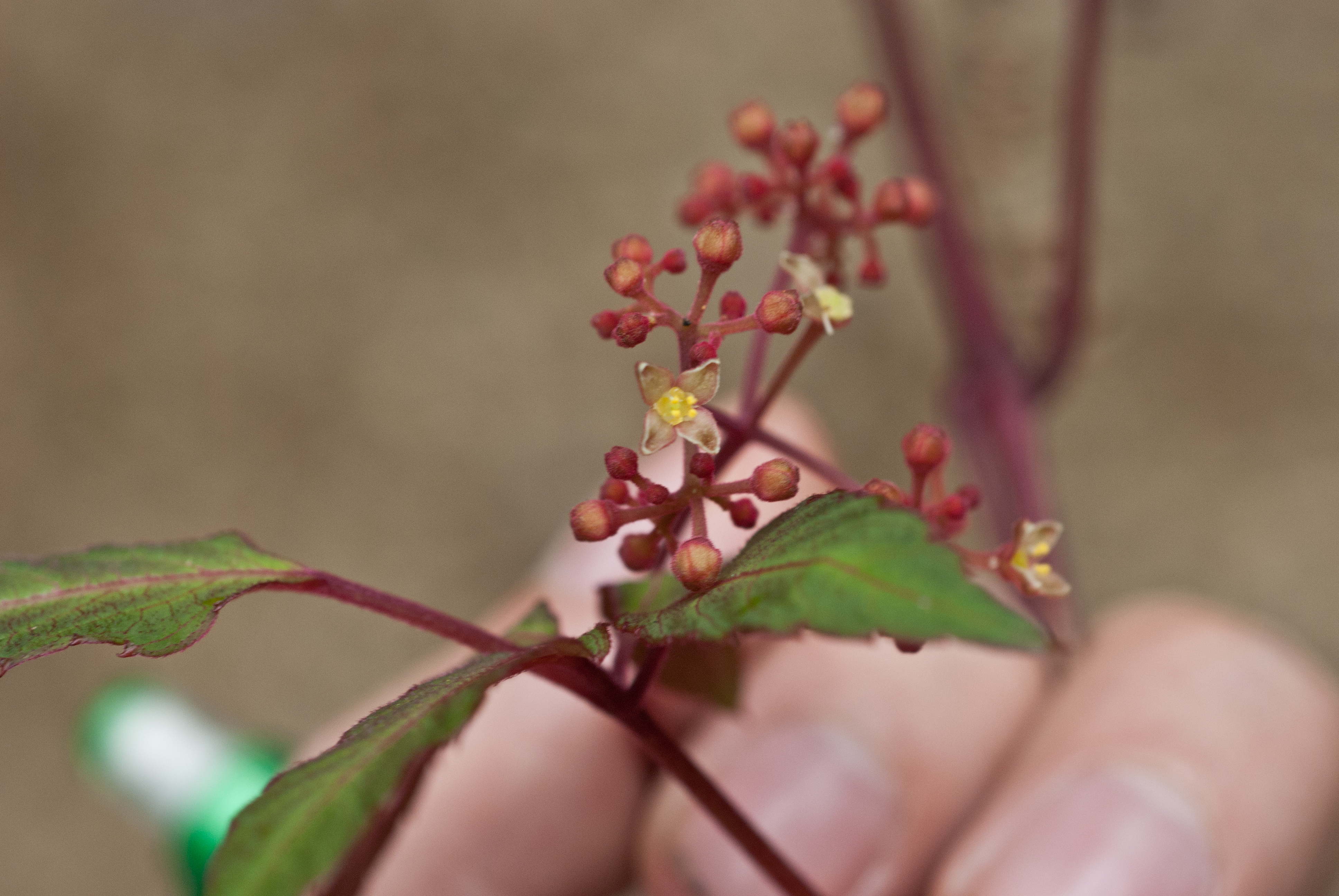 Cayratia, Cayratia formosana Hsu & Kuoh, 台灣烏蘝莓, 烏蘝莓屬